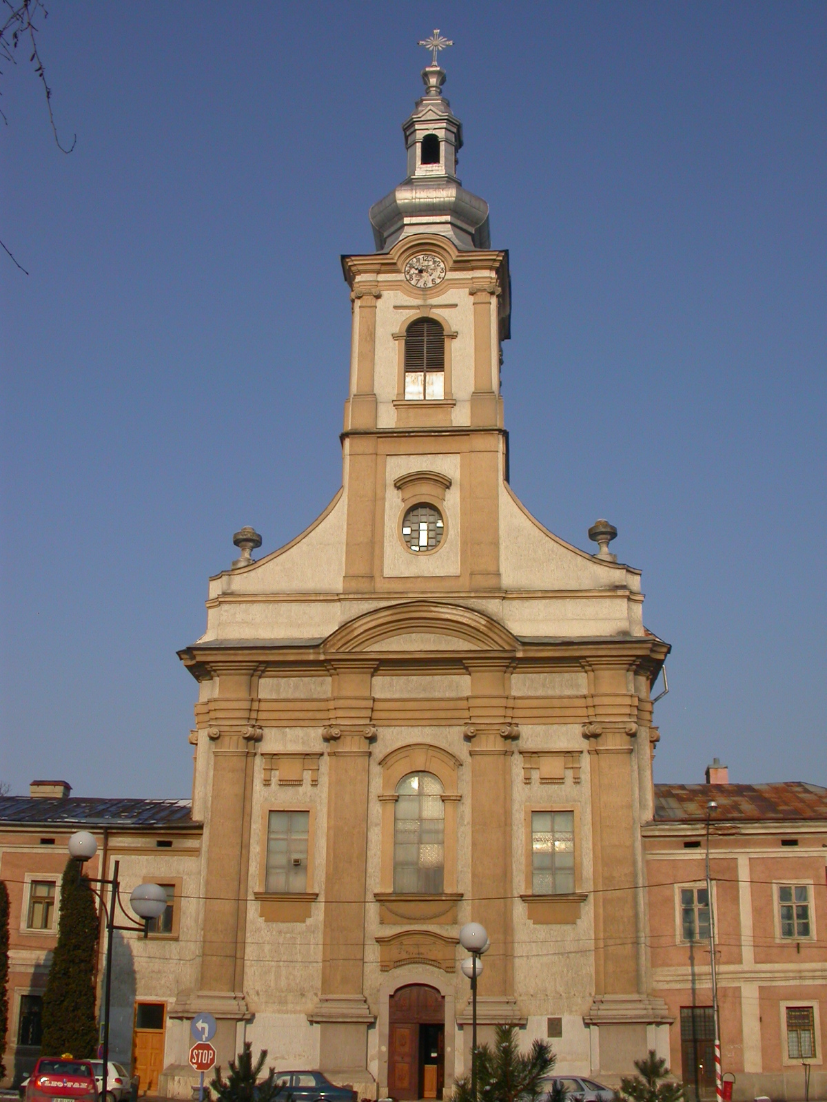 Biserica "Sf. Carol de Borromeo" 1730-1806 01